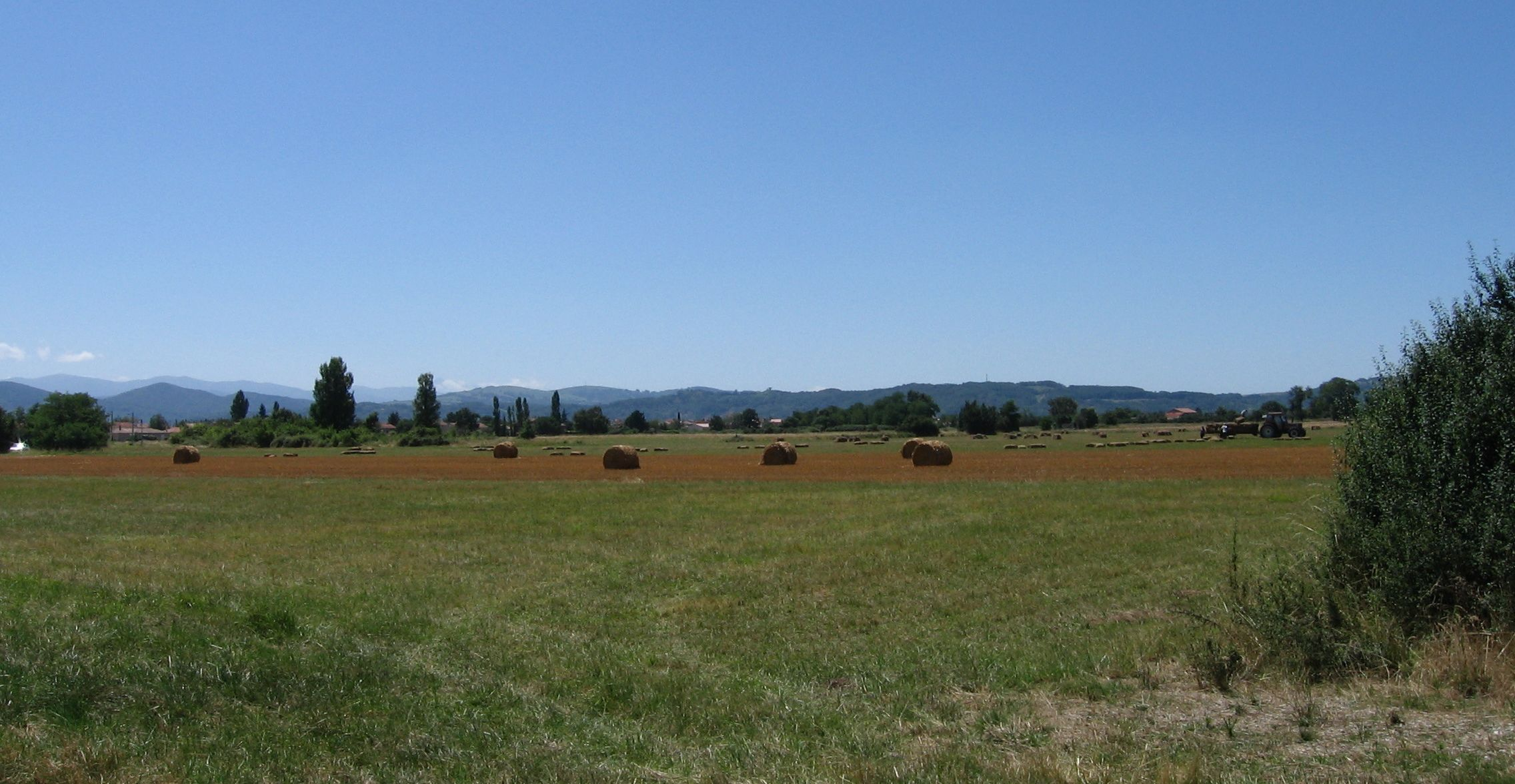 Plaine d'Ariège : étendue agricole autour de La Tour-du-Crieu